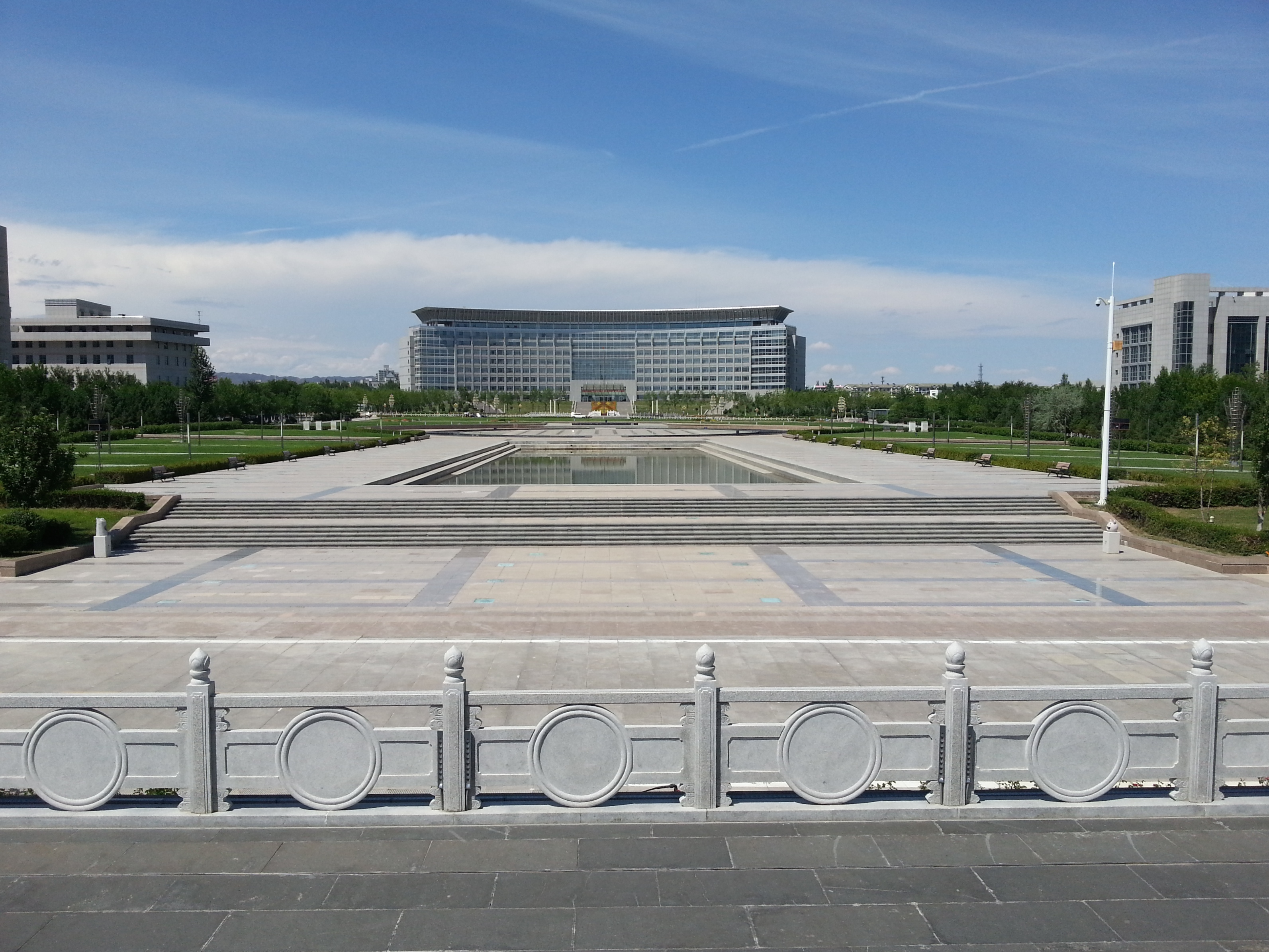 Karamay "rådhus" hvor byprefekturen administreres fra.